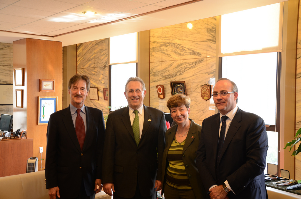 México D.F., 24 de febrero de 2012 - El Embajador Anthony Wayne se reunió con representantes de Save the Children México en sus oficinas en la Embajada. Este grupo se enfoca en crear cambios positivos y duraderos en la calidad de vida de familias marginadas a través de la participación activa de niños, niñas y adolescentes en su propia formación educativa. Michael Klosson (Vicepresidente de Políticas y Respuesta Humanitaria, Save the Children E.U.), María Josefina Menendez (CEO, Save the Children México), Roy Caple Hernández (Encargado del Consejo, Save the Children México), le platicaron al Embajador con respecto al invaluable trabajo que hace su organización en México. Durante la reunión, el Embajador notó que Save the Children México y la Embajada de los E.U. comparten objetivos en común para mejorar el futuro de la juventud de México. Expresó su esperanza de que la Embajada pudiera encontrar formas de colaborar para apoyar las valiosas acciones humanitarias de Save the Children, que ayuda a cientos de miles de niños mexicanos cada año.